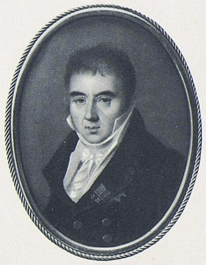 Пётр Кириллович Разумовский (1751—1823), обер-камергера, был женат на фрейлине С.С.Черторыжской, ур. Ушаковой (1746—1806).